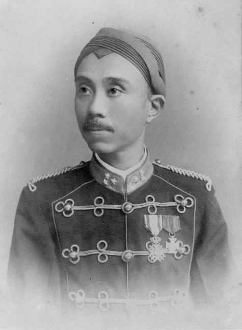 Repronegatif. Raja Mangkunegara VI, penguasa wilayah Mangkunegaran selama 44 tahun.